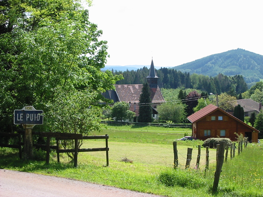 Le Puid Commune du canton de Senones (Vosges) Au fond à droite, l'Ortomont (694 m) Photo personnelle du 4 juin 2006. Copyright © Christian Amet